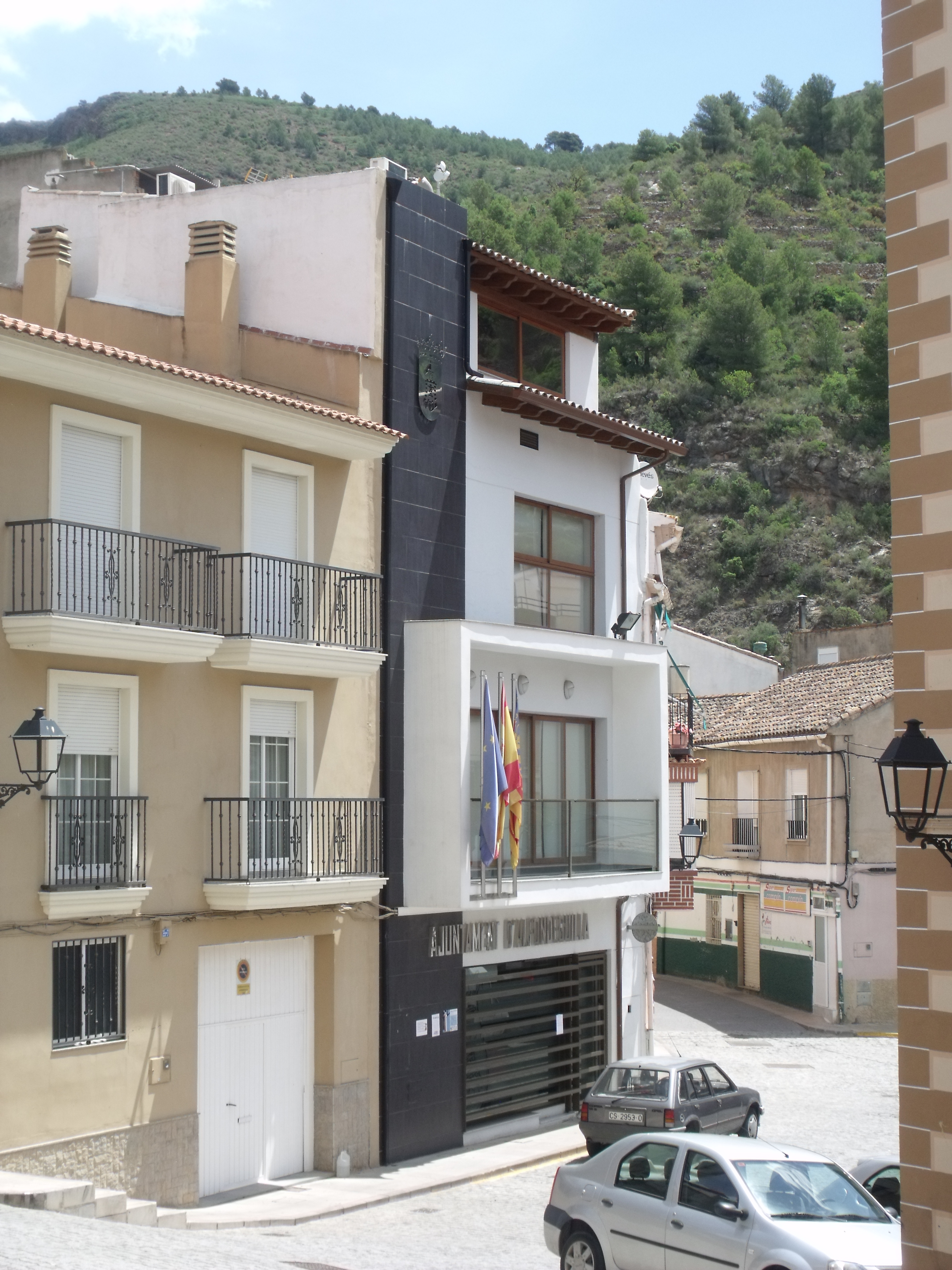 Ayuntamiento